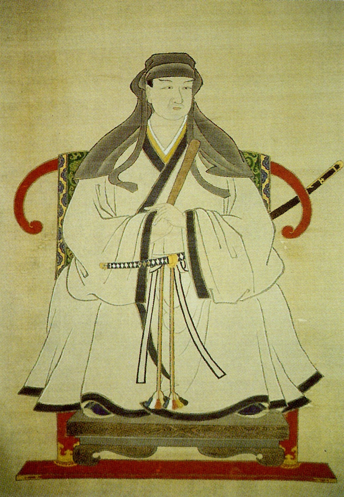 多久茂文の肖像。